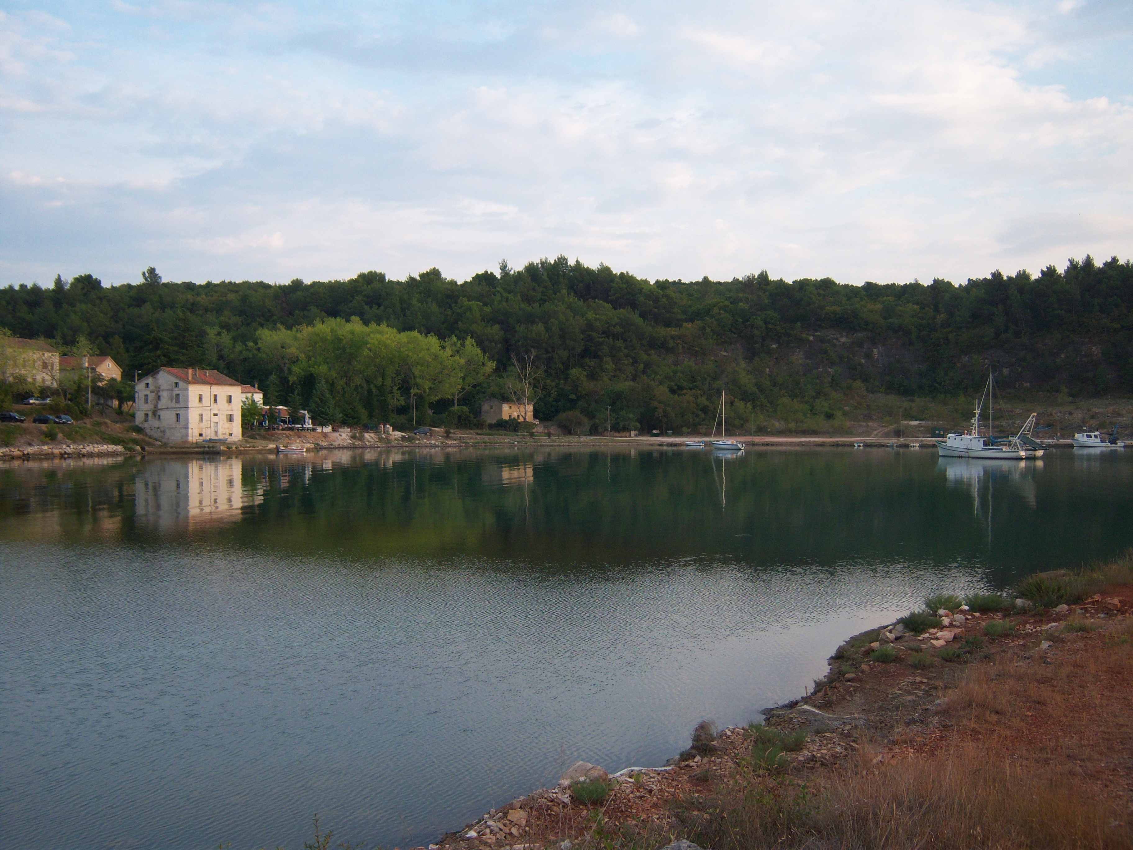 antenal istria